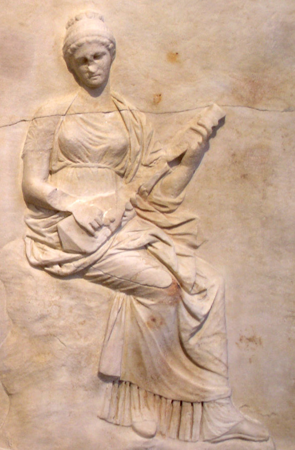 Bas-relief d'un piédestal, en marbre, provenant de Mantinée en Arcadie. Il s'agissait du décor de la base d'un groupe statuaire de la trinité délienne Léto, Apollon et Artémis, ou d'un autel. La plaque présente trois des neuf muses tenant des instruments de musique et des rouleaux de parchemins. Les reliefs sont de style praxitélien et sont probablement l'œuvre d'un disciple du grand sculpteur. Milieu du IVe s. av. J.-C. Musée archéologique national, Athènes.